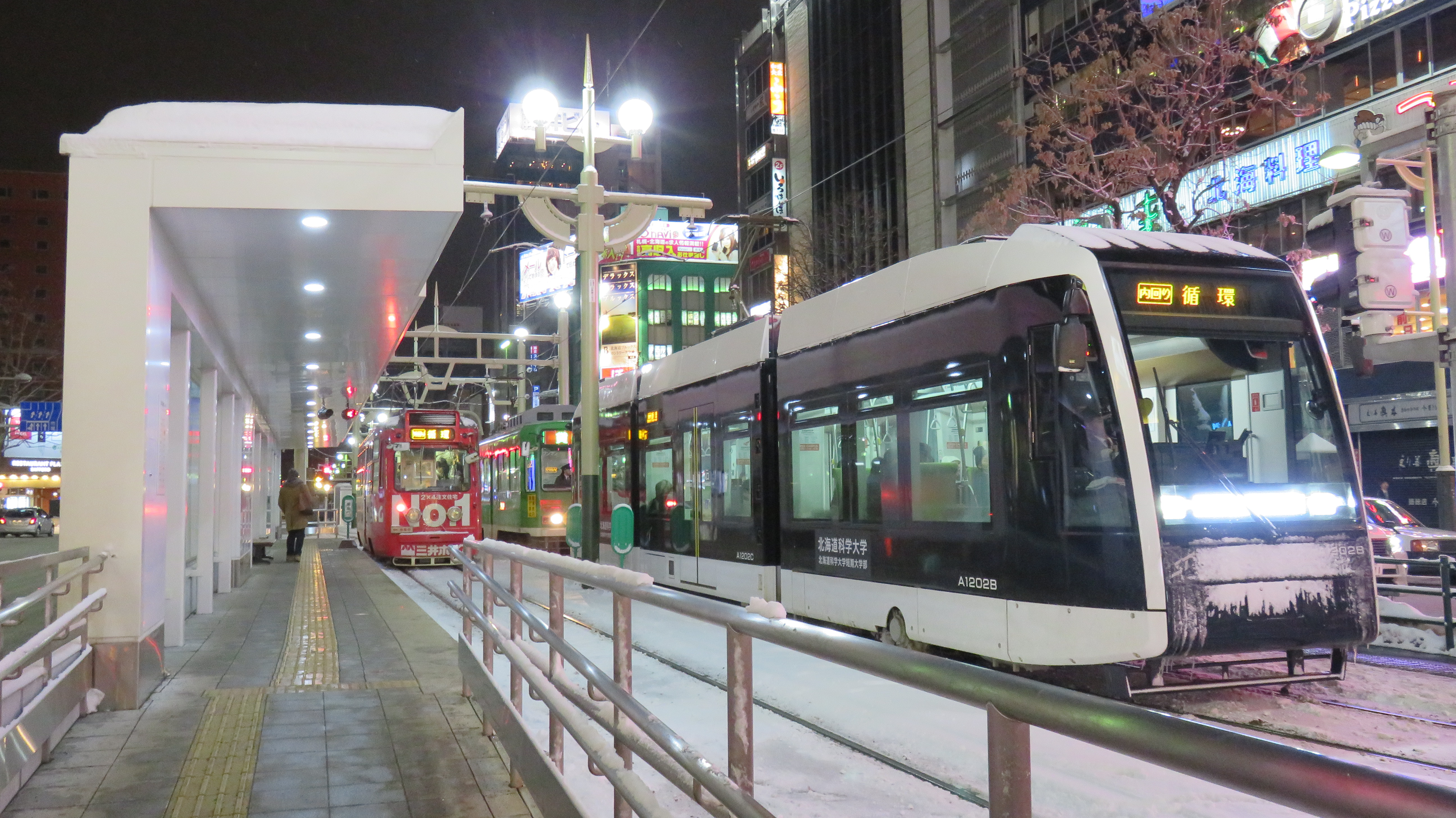 すすきの停留所